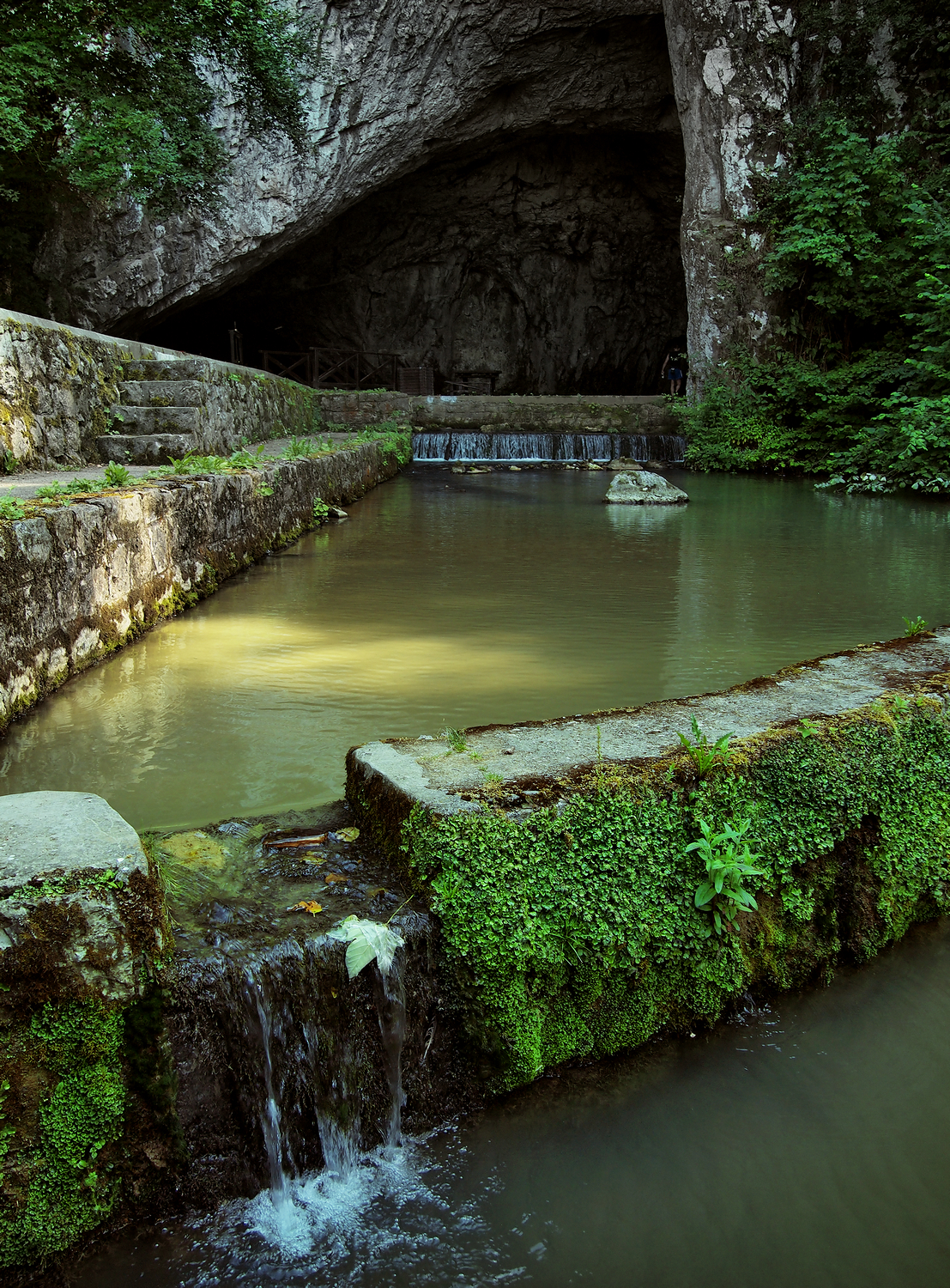 Природни споменик Петничка пећина